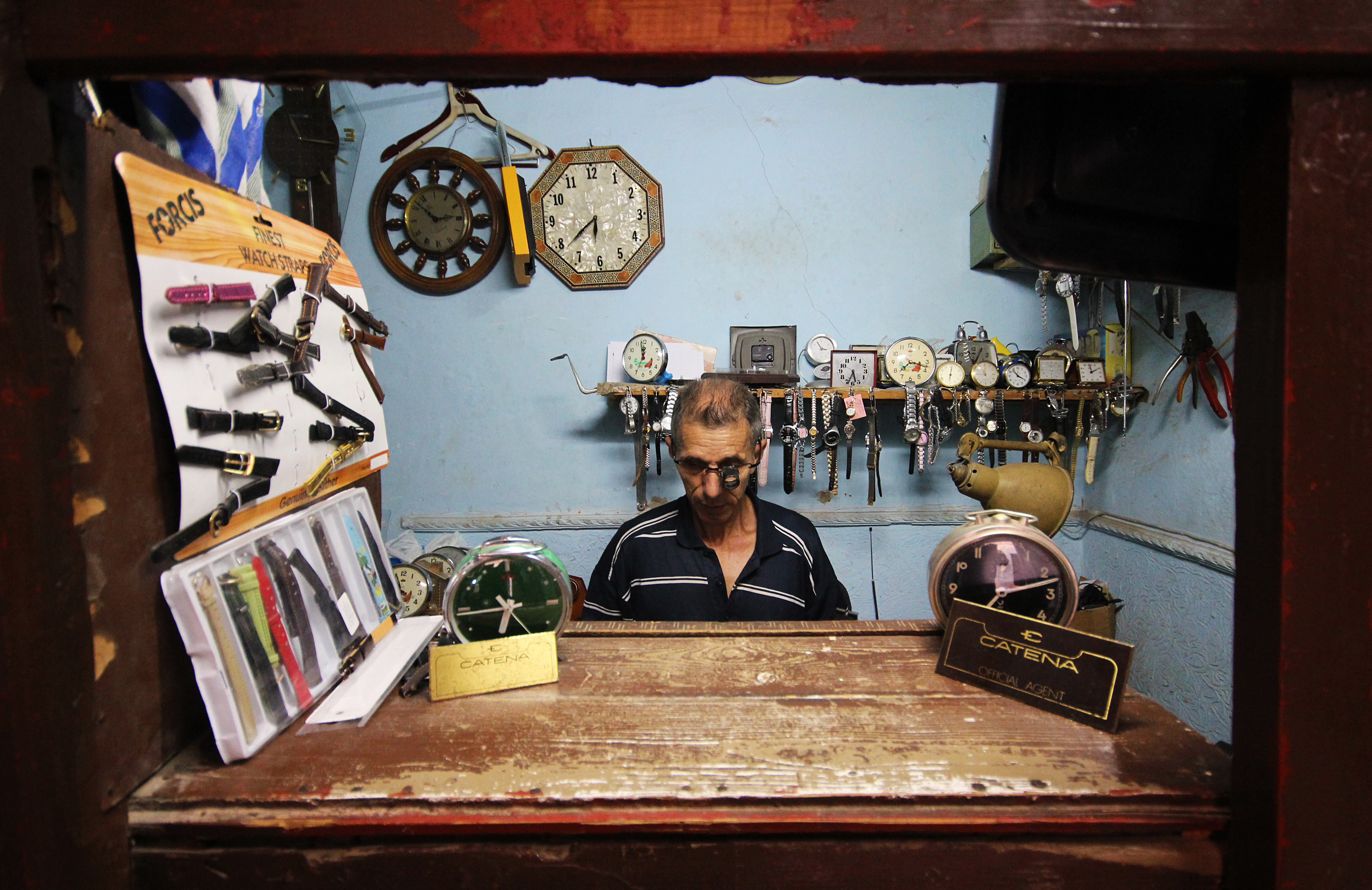 Mr terrari pour que le temps ne s'arrete jamais This is an image of "African people at work" from Algeria